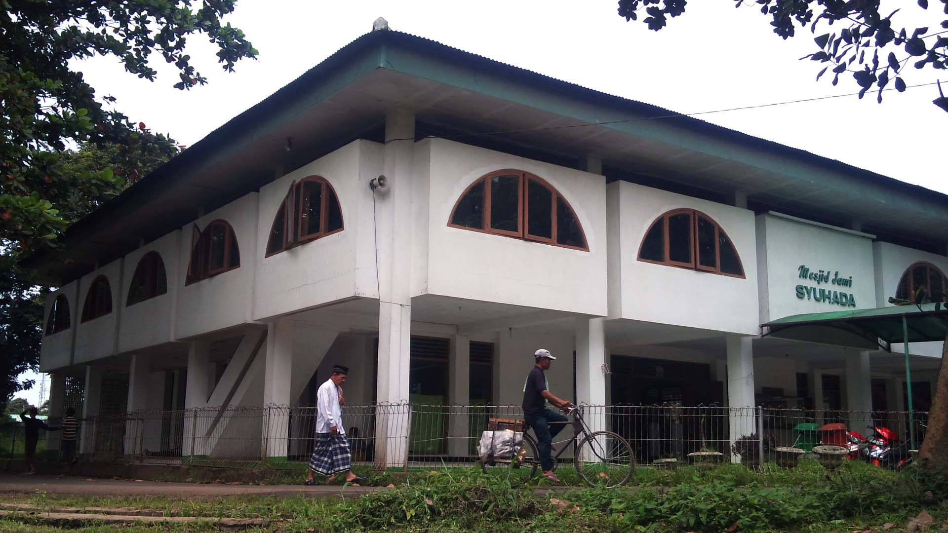 Masjid Jami Syuhada, Cikaret, Harapan Jaya, Cibinong, Bogor, Jawa Barat